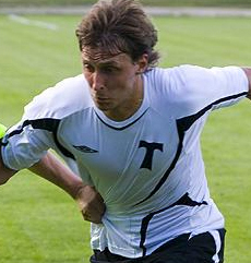 Vladimir Voskoboinikov, Estonian footballer.